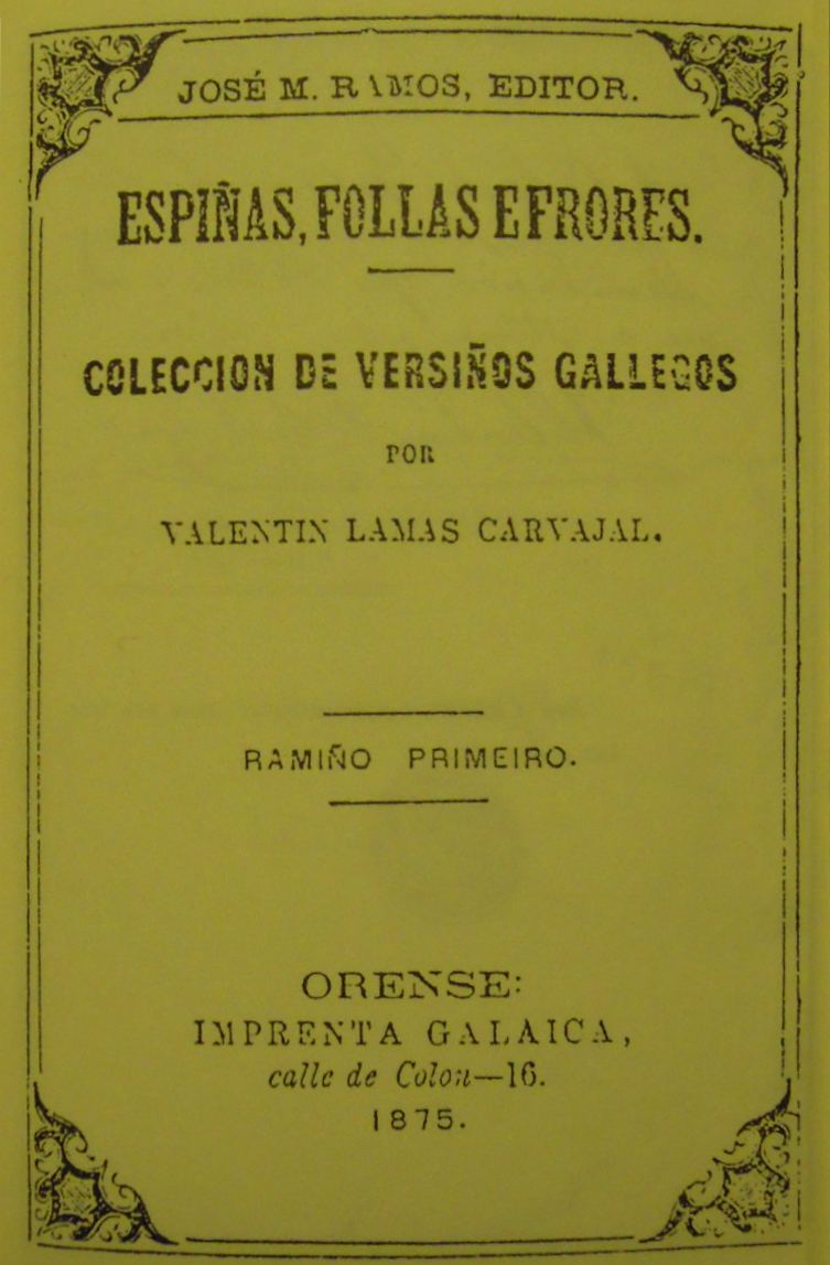 Portada facsímile da primeira edición de Espiñas, follas e frores (ramiño primeiro, 1875), de Valentín Lamas Carvajal, co seguinte texto: JOSÉ M. RAMOS, EDITOR.ESPIÑAS, FOLLAS E FRORES,COLECCION DE VERSIÑOS GALLEGOSPORVALENTIN LAMAS CARVAJALRAMIÑO PRIMEIRO.ORENSEIMPRENTA GALAICA,calle de Colon-16.1875